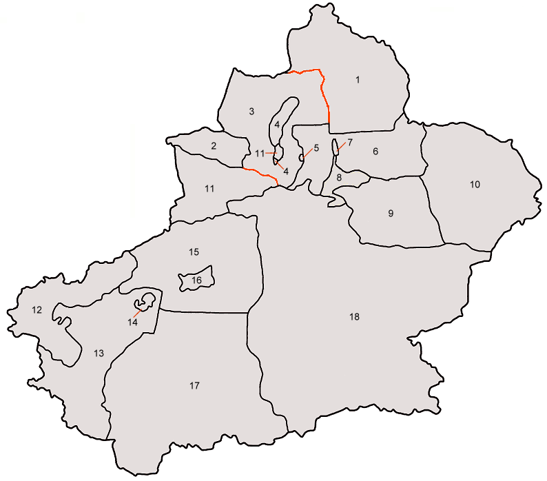 A Xinjiang Map